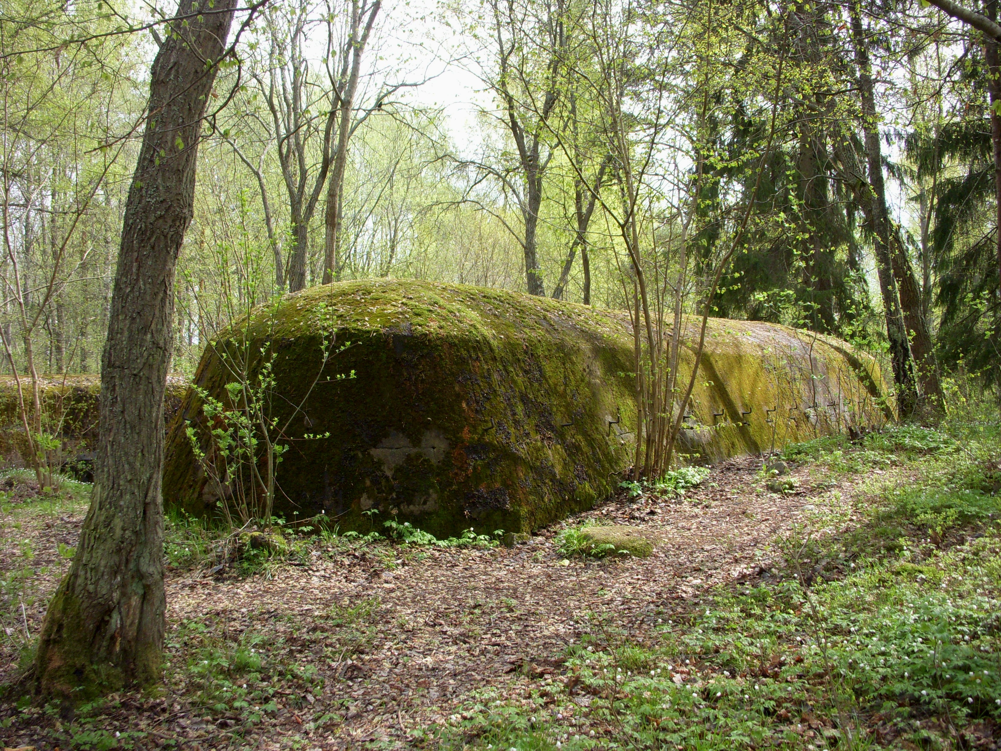 Sjötorpsfortet i Tyresö från första världskriget i maj 2011